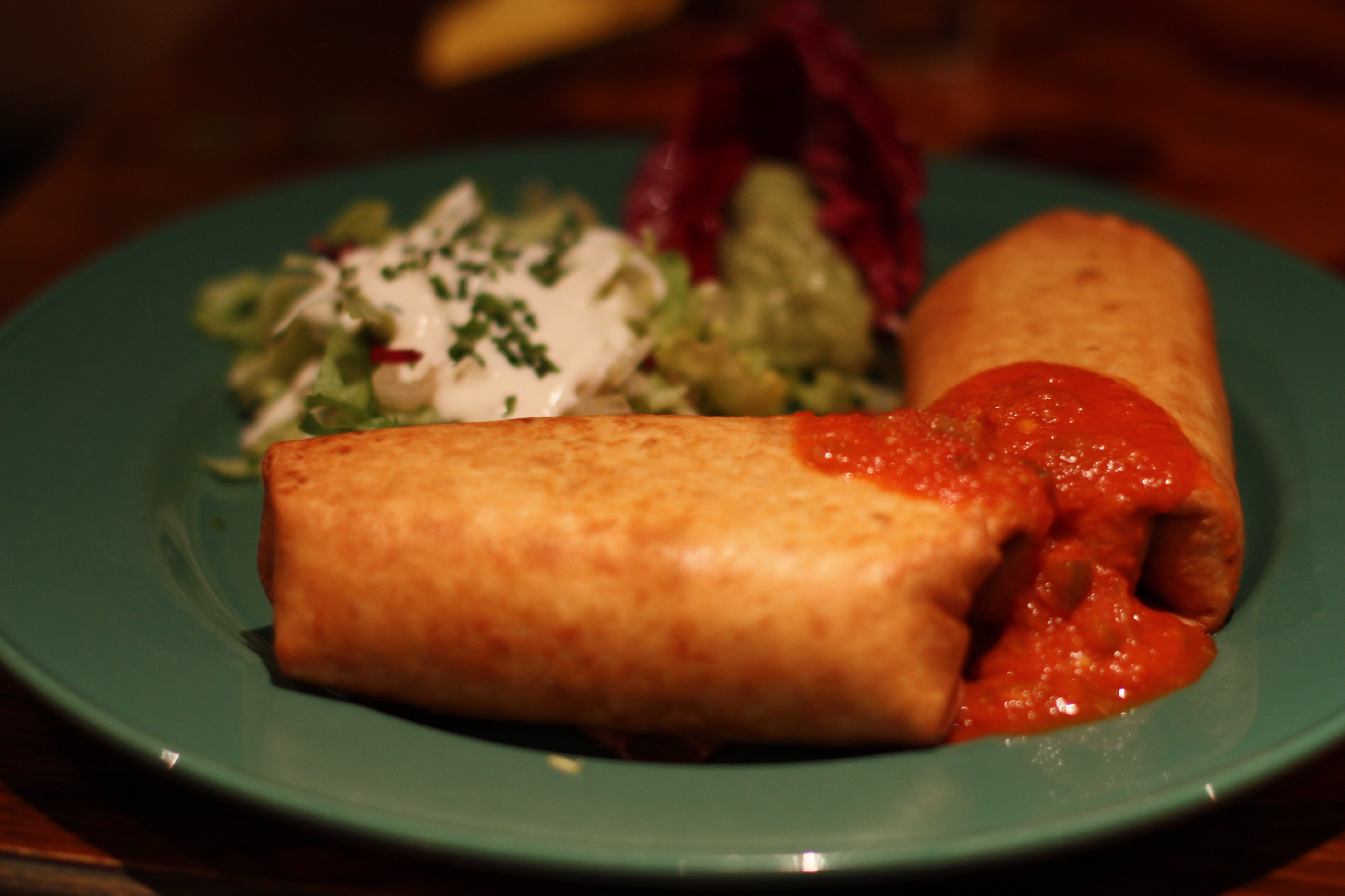 Chimichanga in Breme